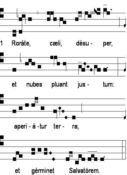 Introït "Rorate" (4° D. Adventus), exemple du premier mode